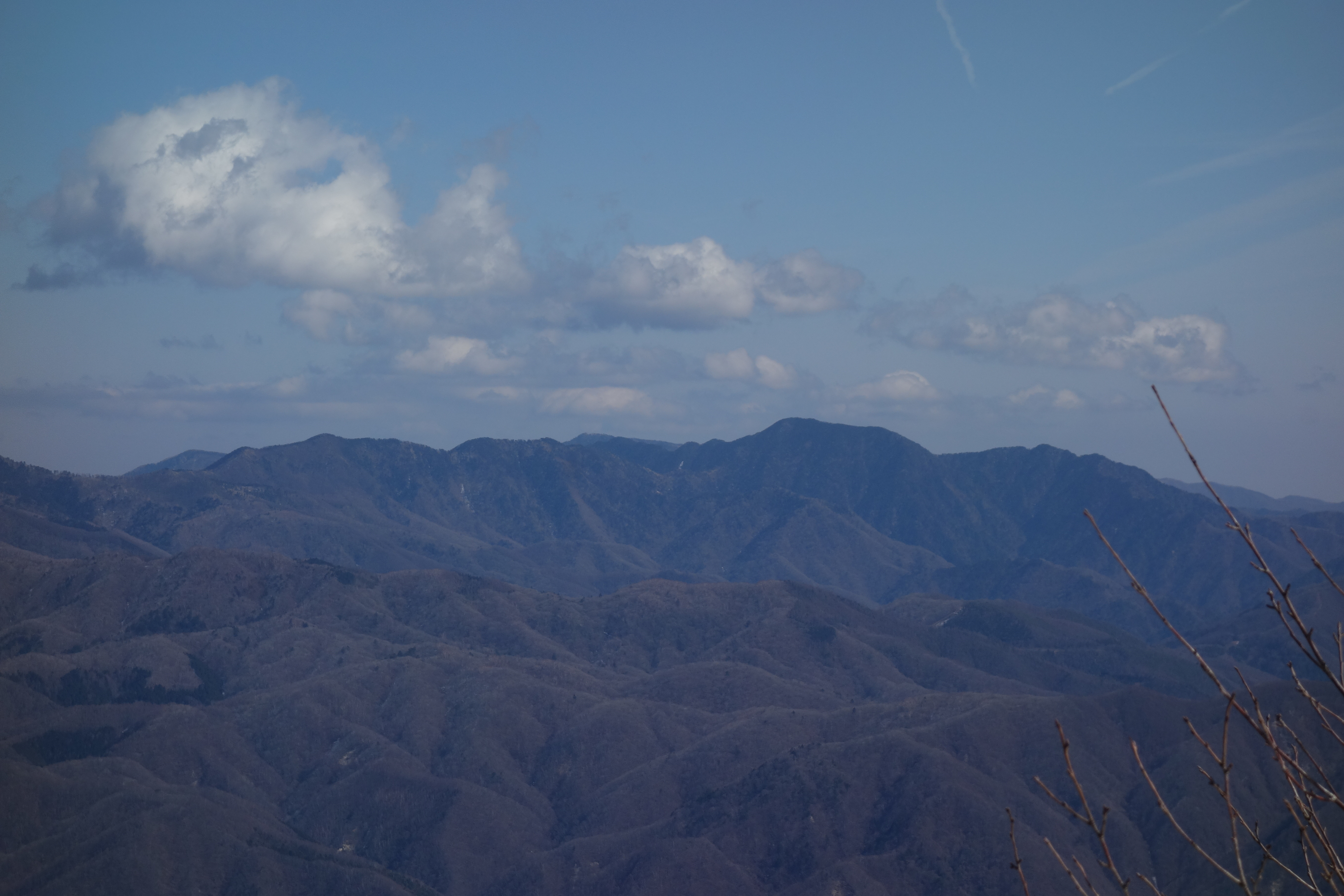 乾徳山から見た奥秩父山塊3